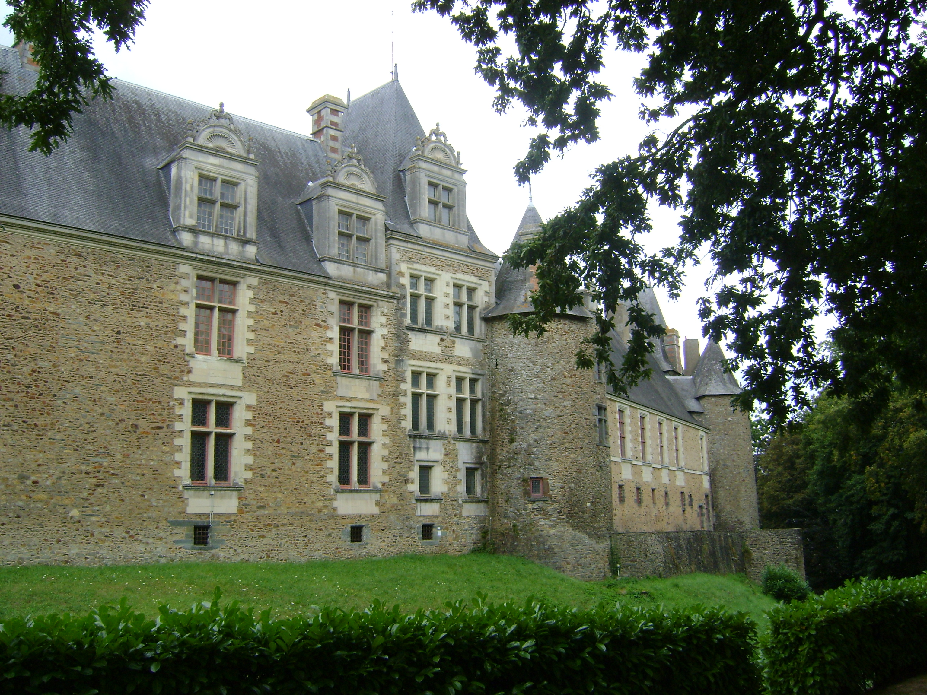 Le château de Châteaubriant. Loire-Atlantique. Vue générale. .